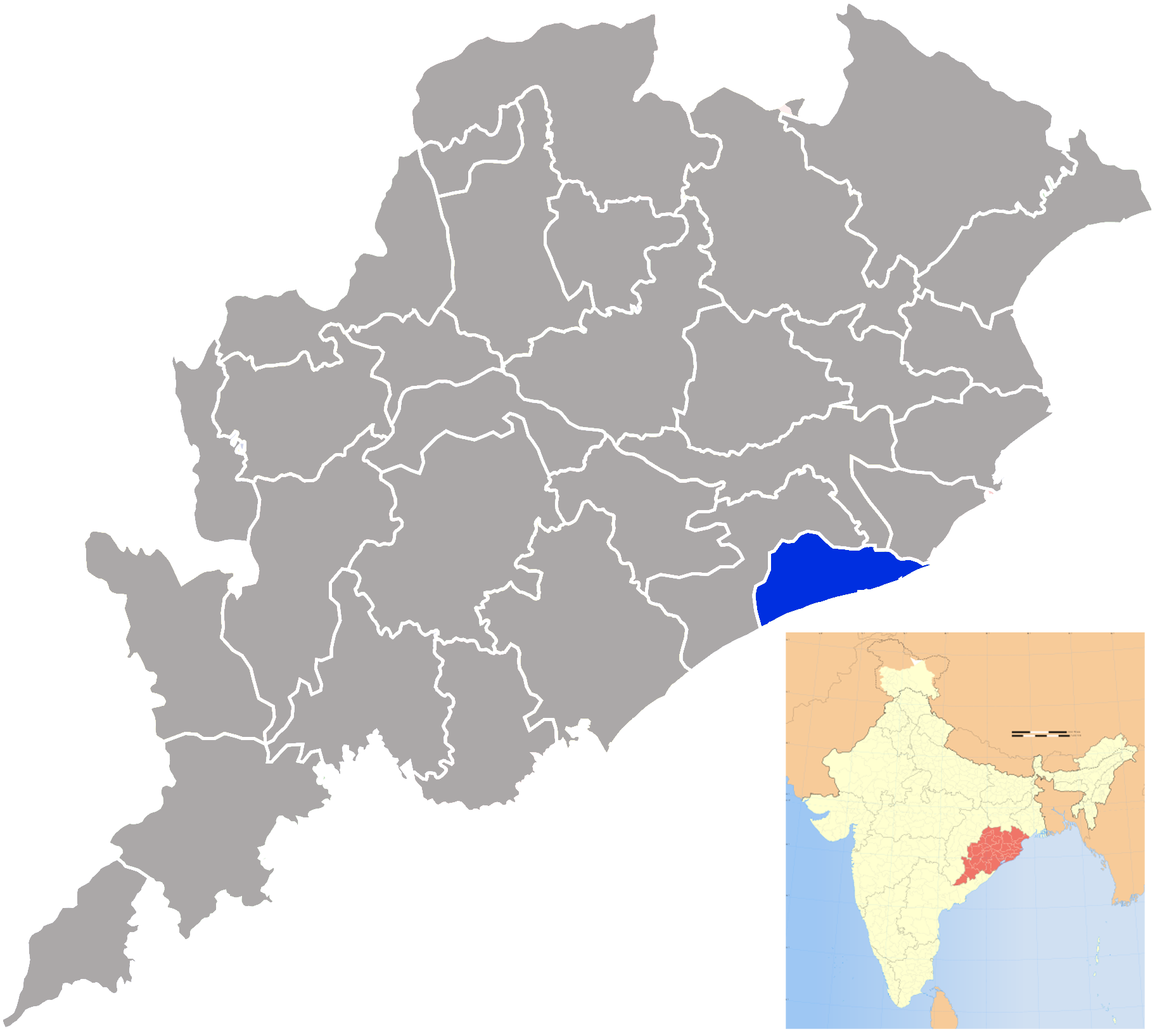 Distrito de Puri en Orissa